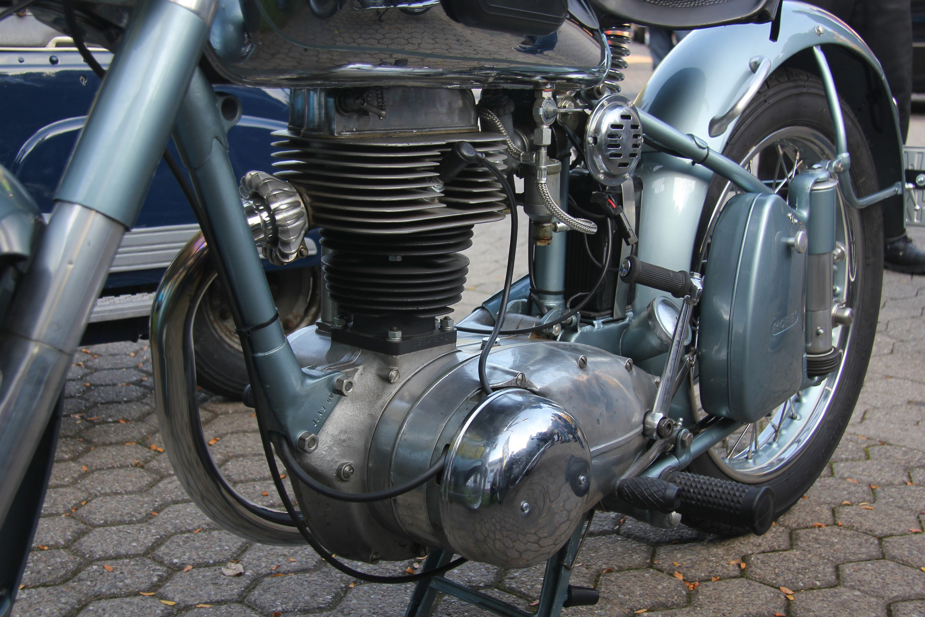 Horex Regina Sport bei der Moselschiefer-Classic des AC Mayen